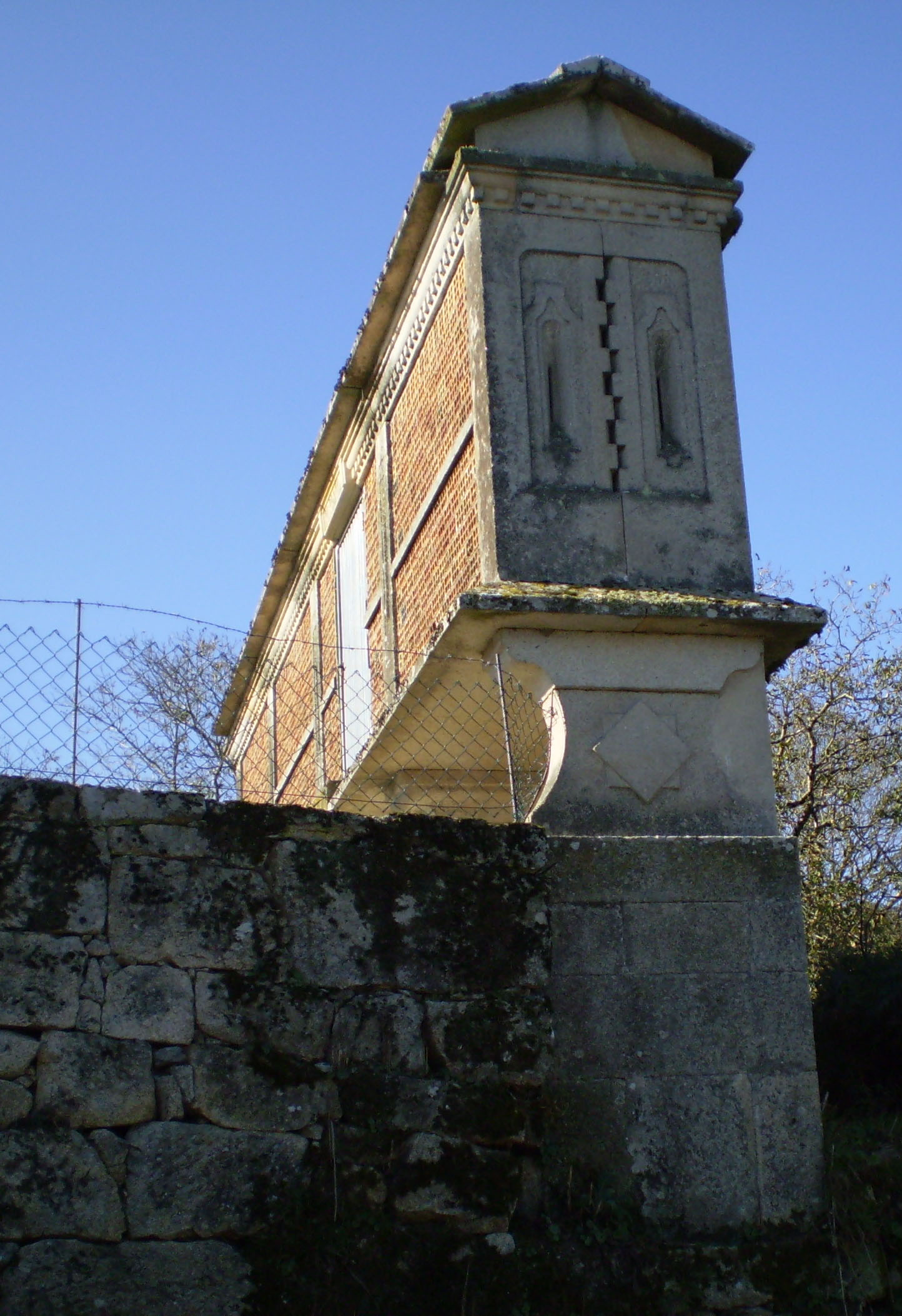 Hórreo de tipo mahía, de catro claros, elevado sobre soleira e cepas de dous tramos. Cuberta é de lousas de canteiría. Destaca a elaboración dos penais, para favorecer a aireación da cámara. Ubicado no lugar de Castro, na parroquia de Santa Cristina de Areas do Concello lugués de Antas de Ulla.